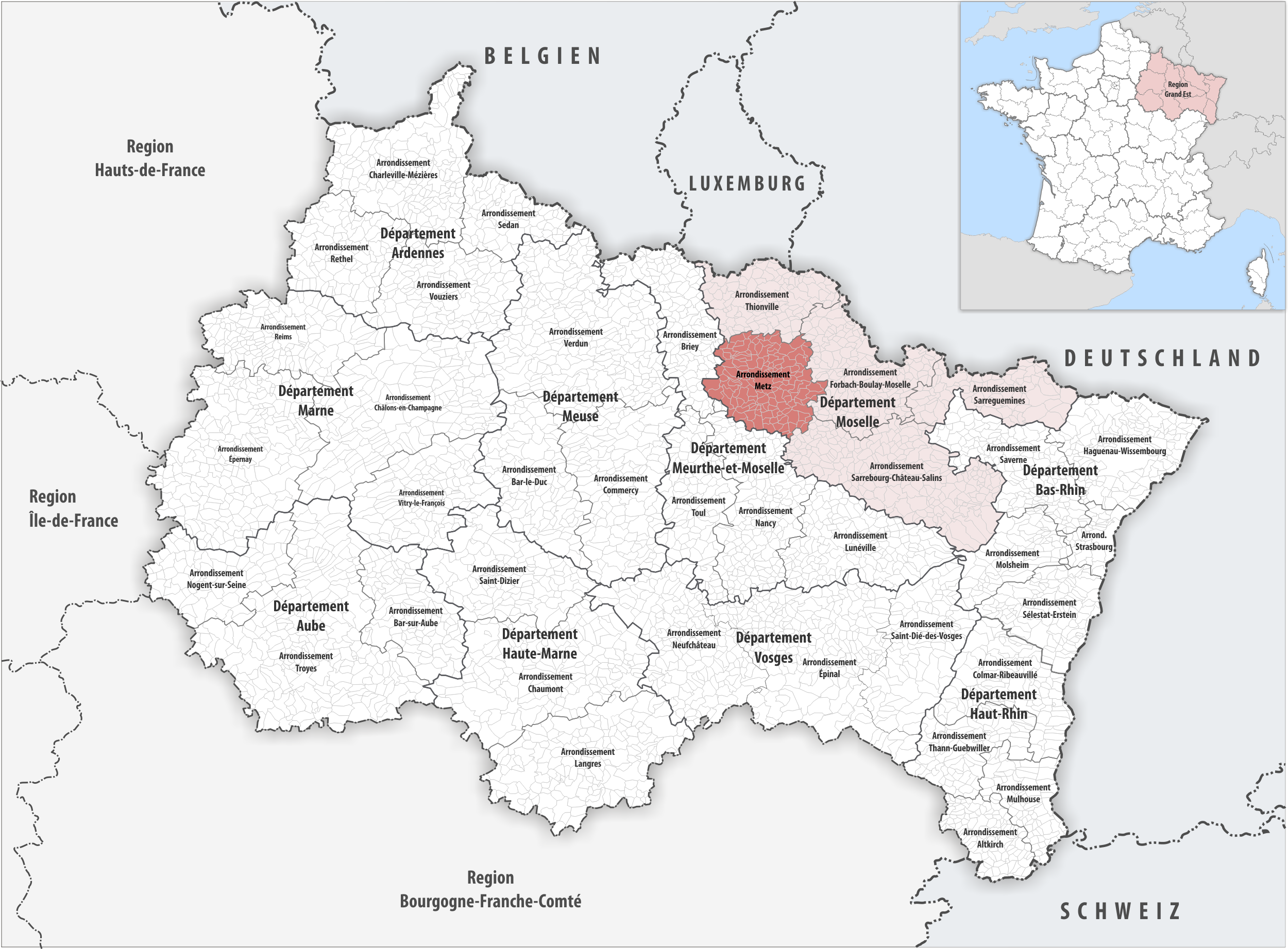 Lage des Arrondissements Metz